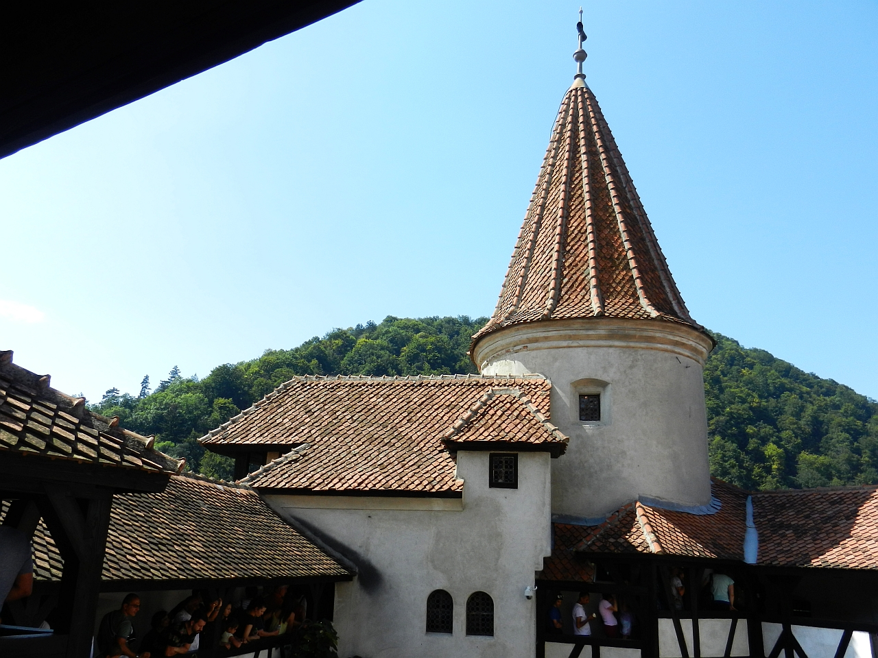 Incinta fortificată, donjonul, turnul de poartă, turnul pulberăriei 04